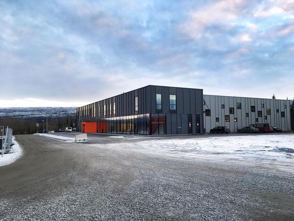 Bilde av det nye TIP-bygget på studiested Mjølan